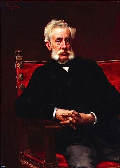 Ramón Pérez Costales 1897 Joaquín Vaamonde, Museo de Belas Artes da Coruña